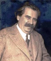 Móricz Zsigmond magyar író